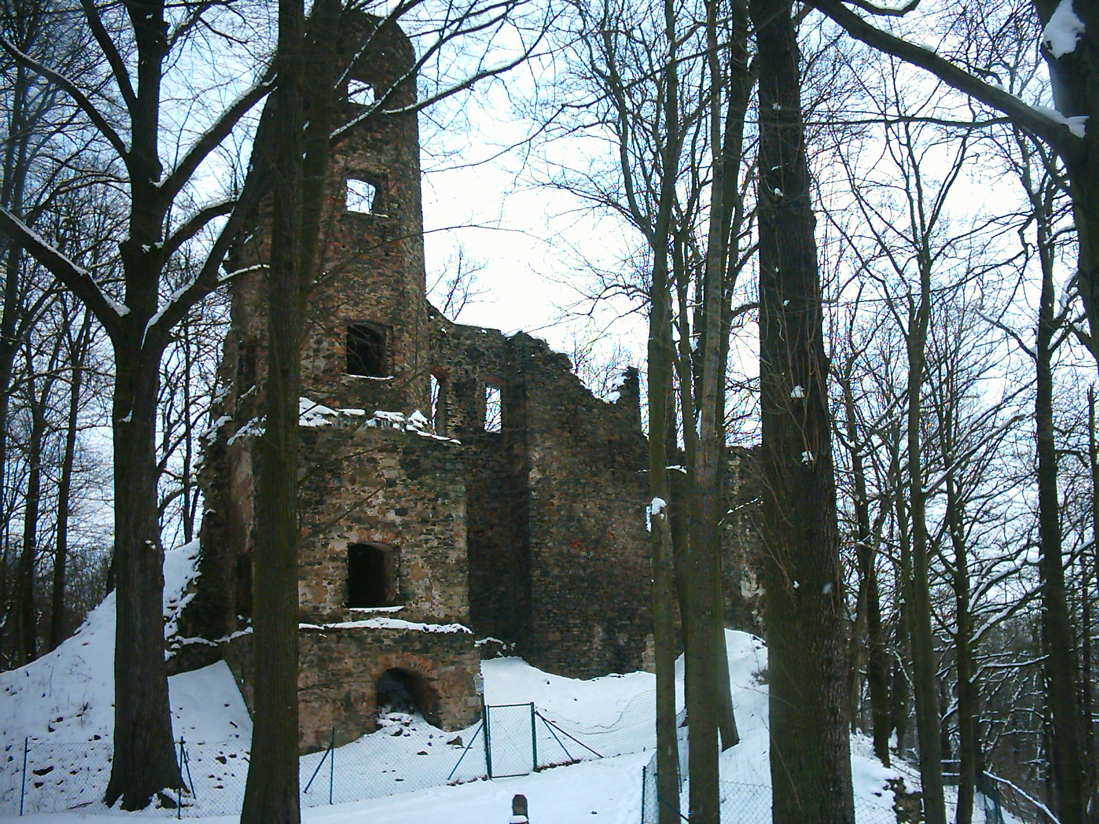 Die Ruine der Burg Liebau in der Gemeinde Pöhl im Vogtland (Sachsen, Deutschland)